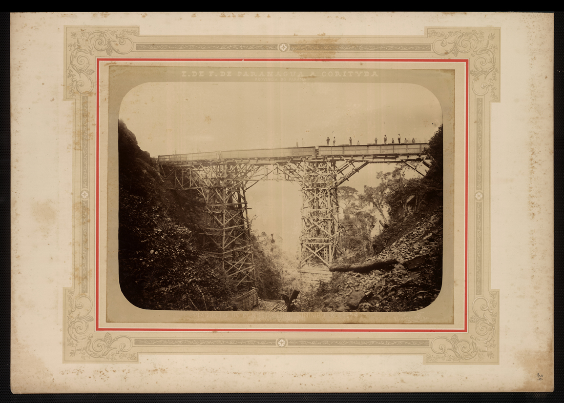 Ponte da E. F. EF Paranagua a Corityba Viaducto do Conselheiro Sinimbu, K. 64,292, 3 vãos de 20m